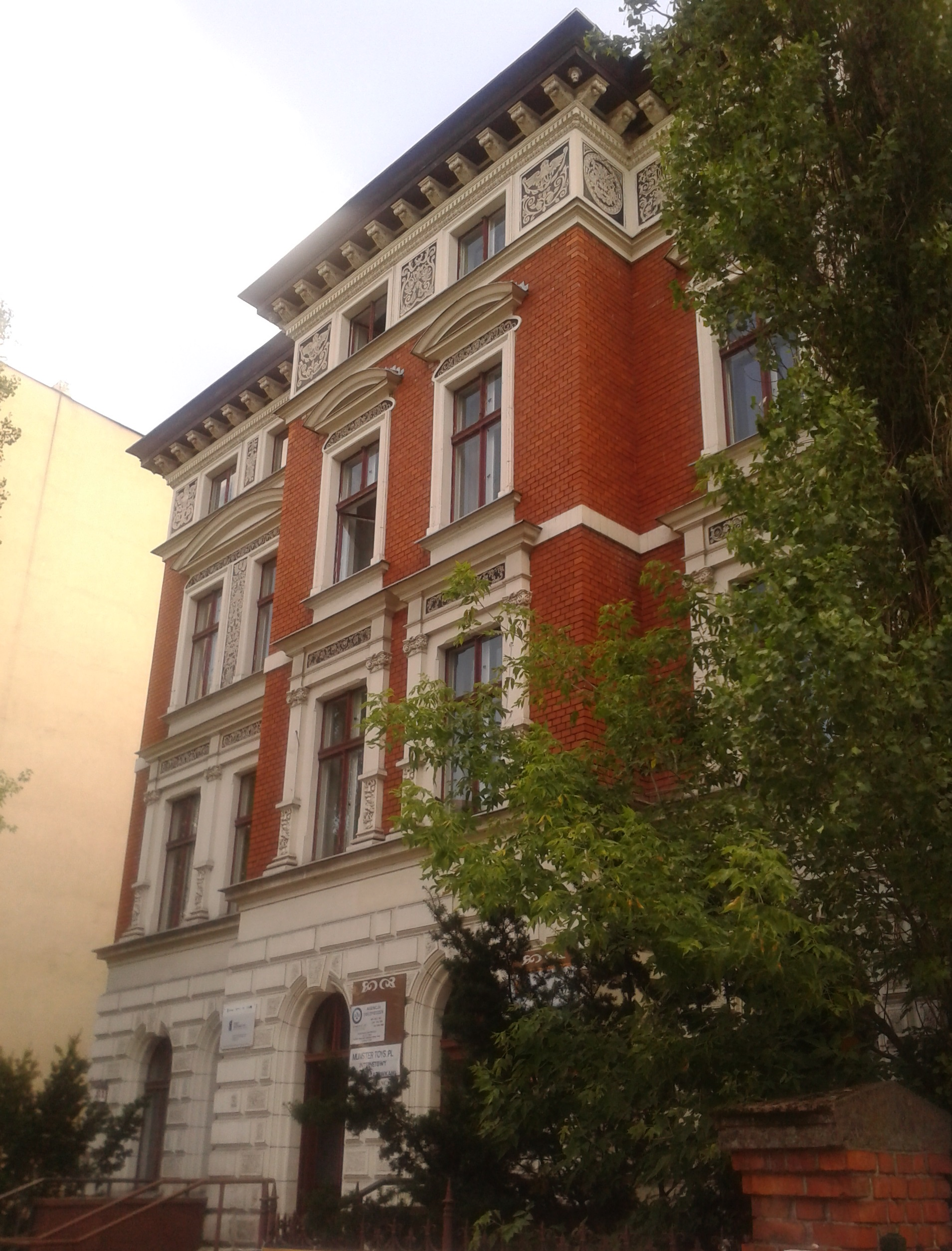 Druga siedziba Regionalnego Ośrodka Polityki Społecznej w Toruniu - ulica Mickieiwicza 81a w Toruniu